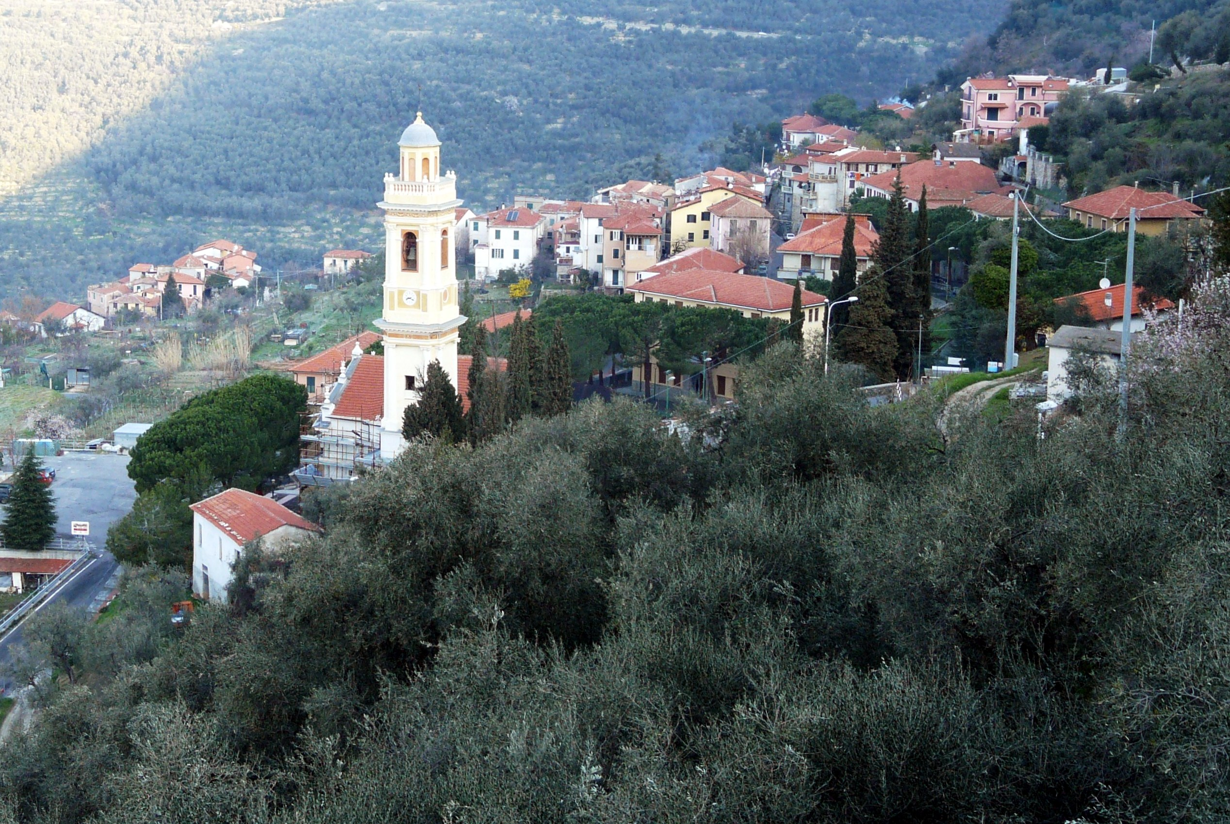 Panorama di Chiusanico, Liguria, Italia